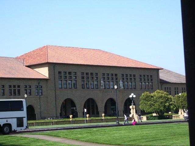 La entrada de la Universidad de Stanford en California